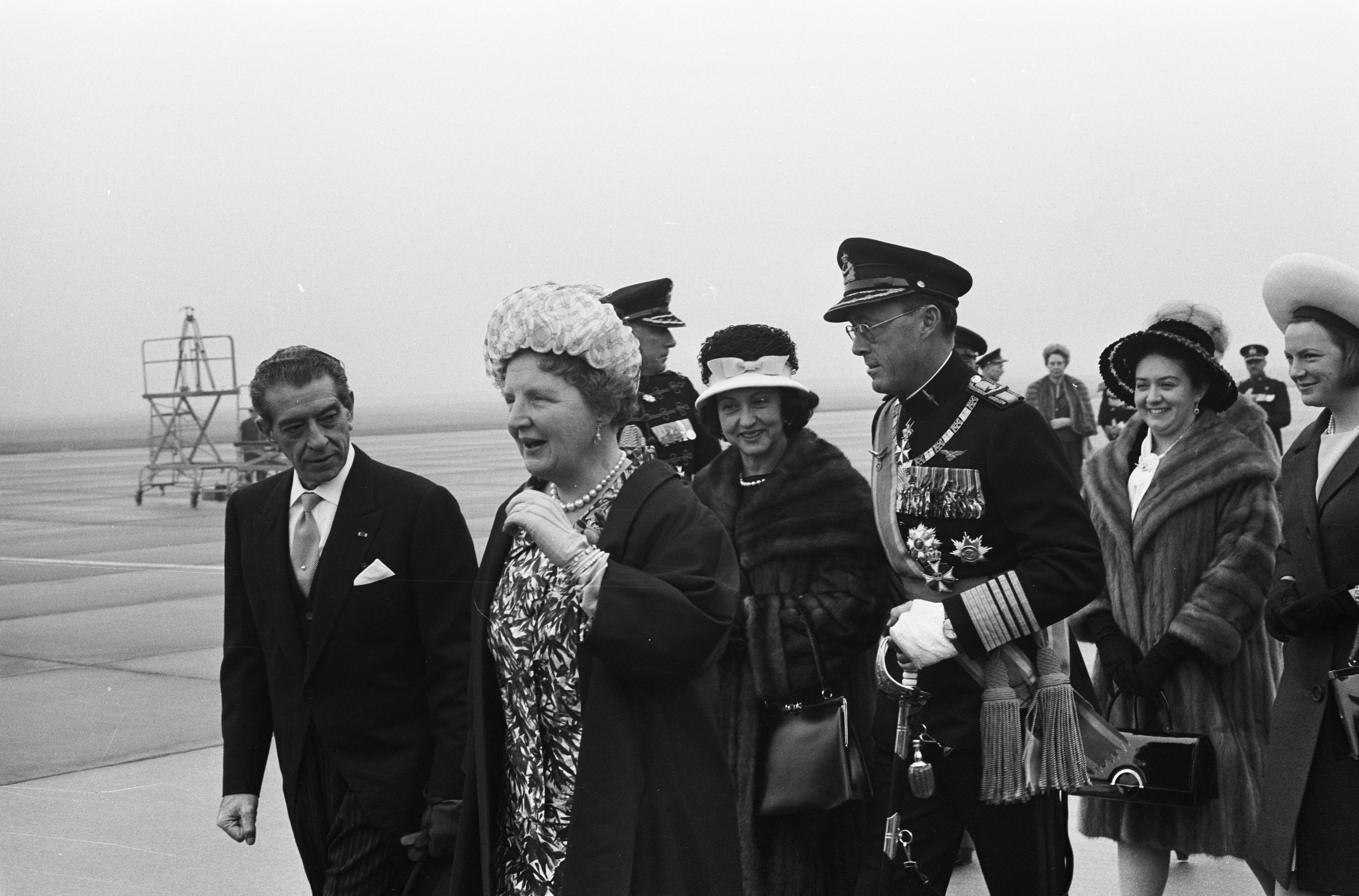 Collectie / Archief : Fotocollectie Anefo Reportage / Serie : Staatsbezoek van president Lopez Mateos van Mexico met vrouw en dochter aan Nederland Beschrijving : Na aankomst op de vliegbasis Ypenburg, v.l.n.r. president Adolfo López Mateos, koningin Juliana, mevrouw López, prins Bernhard, mejuffrouw Lopez Mateos en prinses Irene Datum : 3 april 1963 Locatie : Rijswijk, Zuid-Holland Trefwoorden : koninginnen, presidenten, prinsen, prinsessen, staatsbezoeken Persoonsnaam : Bernhard (prins Nederland), Irene (prinses Nederland), Juliana (koningin Nederland), Lopez Mateos, A. Fotograaf : Fotograaf Onbekend / Anefo, [onbekend] Auteursrechthebbende : Nationaal Archief Materiaalsoort : Negatief (zwart/wit) Nummer archiefinventaris : bekijk toegang 2.24.01.05 Bestanddeelnummer : 915-0009